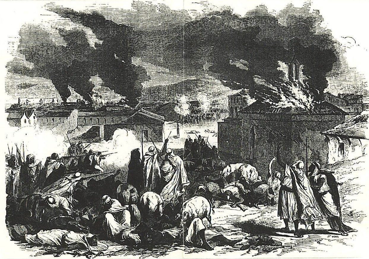 Gravure publiée dans l'Illustration en 1871 et représentant l'insurrection de Bordj Bou Aririj